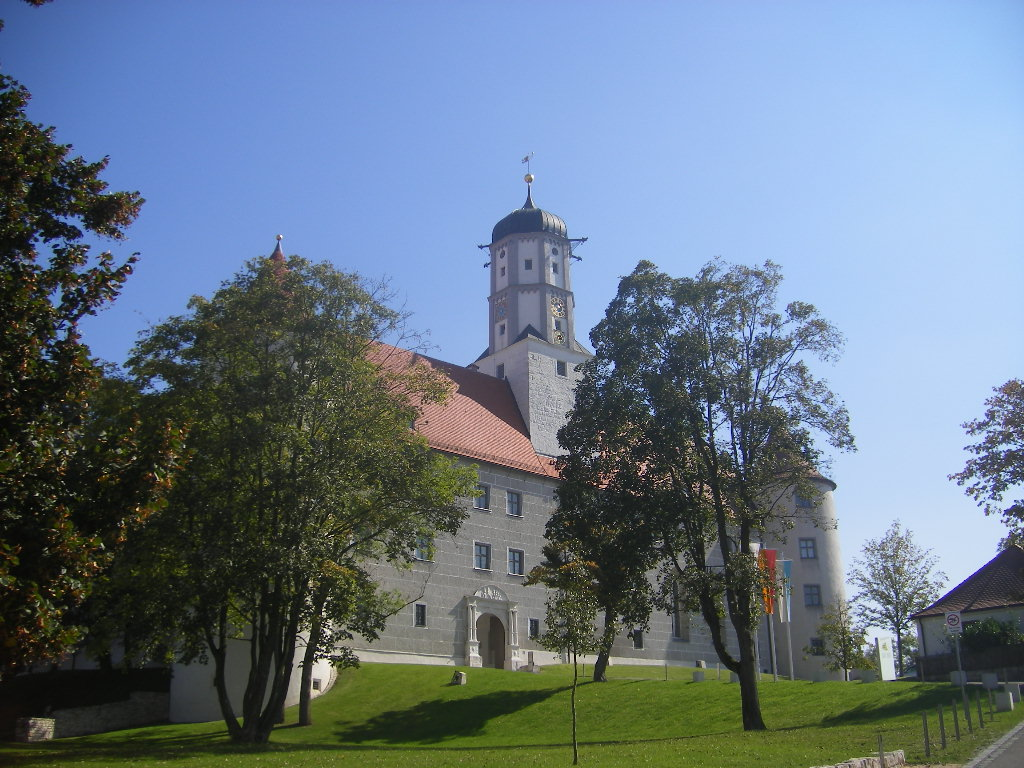 Höchstädt - Castle